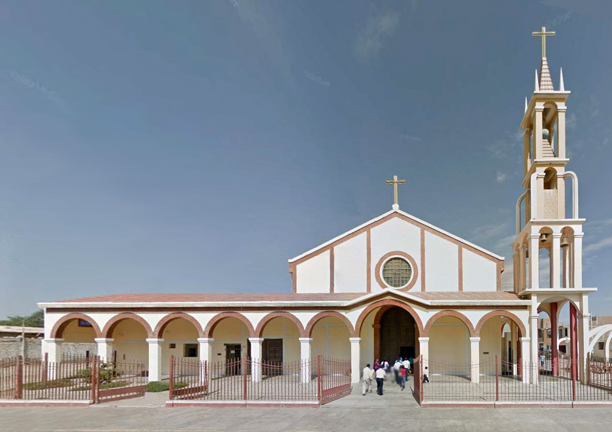 Debido a las lluvias torrenciales del año 1983 el antiguo templo de destruyó quedando sólo en pie la fachada y el campanario. Entonces se propuso la construcción de uno nuevo en vista que el anterior ya no prestaba las garantías necesarias para reconstruirlo. En el año 1986 se empezó a realizar la construcción del nuevo templo con la aprobación del obispado de Chiclayo. Gracias al esfuerzo del R.P José Manuel Pinto Cardenas junto a los pobladores constituye el fortalecimiento de la cultura pero además, expresa el compromiso de la cristiandad con la iglesia católica. El diseño estuvo a cargo del arquitecto Juan Verona Rubio.